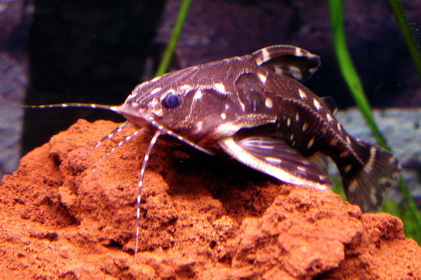 Dies ist ein "Agamyxis pectinifrons". Die Aufnahme ist vom 21.08.2006 .